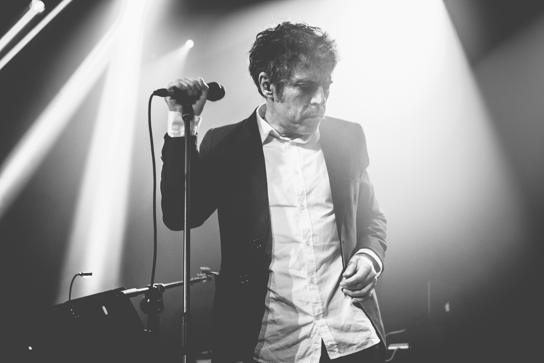 Ivan Ferreiro, Donostia Kulturako Dkluba zirkuituko zuzeneko kontzertuan.